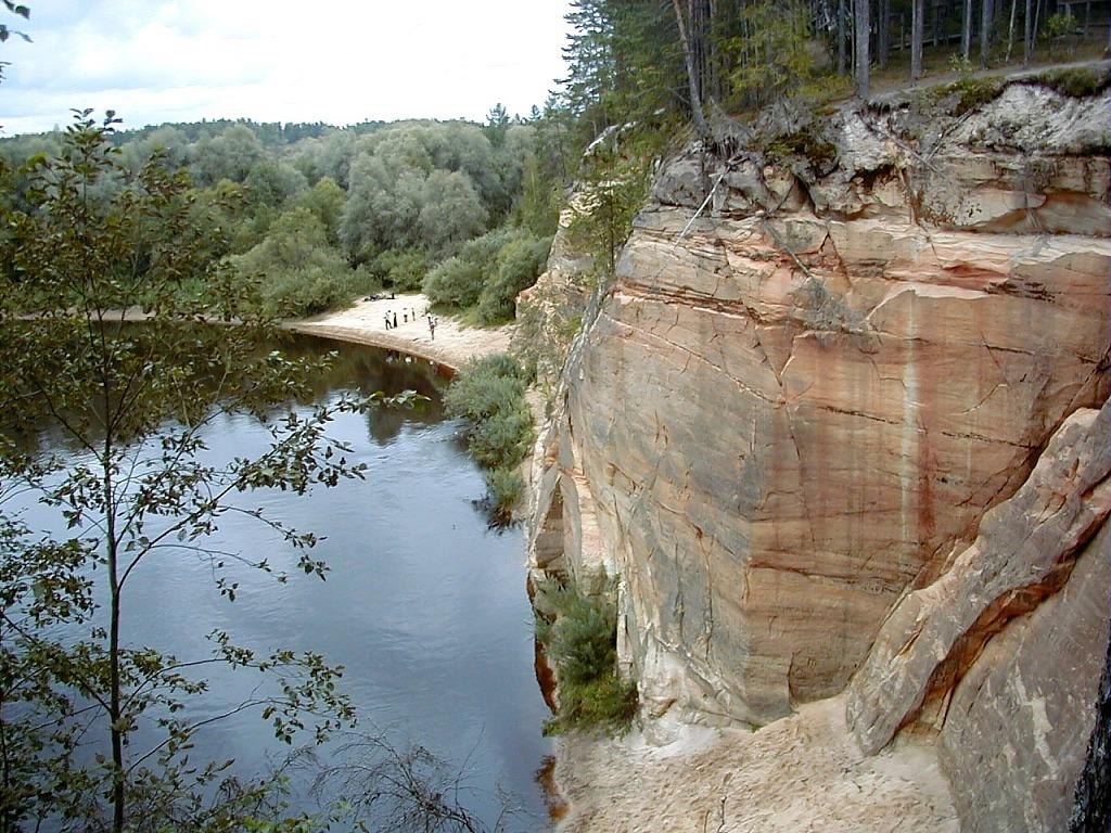 Ērgļu klintis pie Gaujas Cēsu apkārtnē 2000-08-19